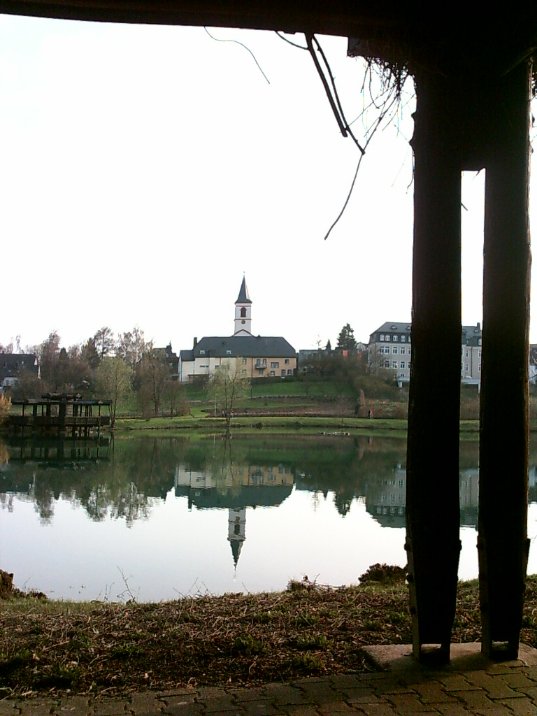 Kurpark Weiskirchen